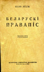 Okładka książki "Biełaruski prawapis" autorstwa Jazepa Losika.